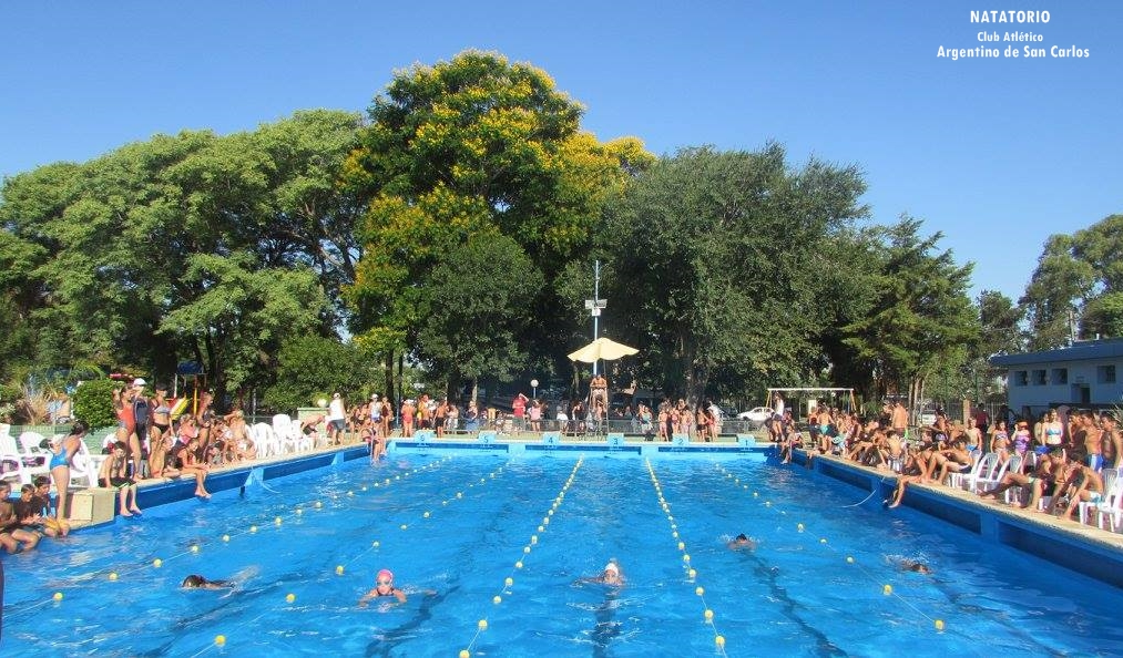 Natatorio Argentino de San Carlos - Pileta para competiciones oficiales (25 metros)